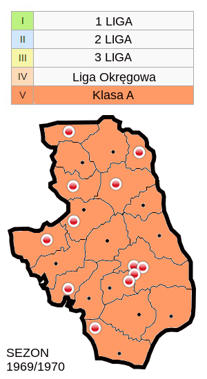 Jagiellonia w sezonie 1969/70- mapa klubów